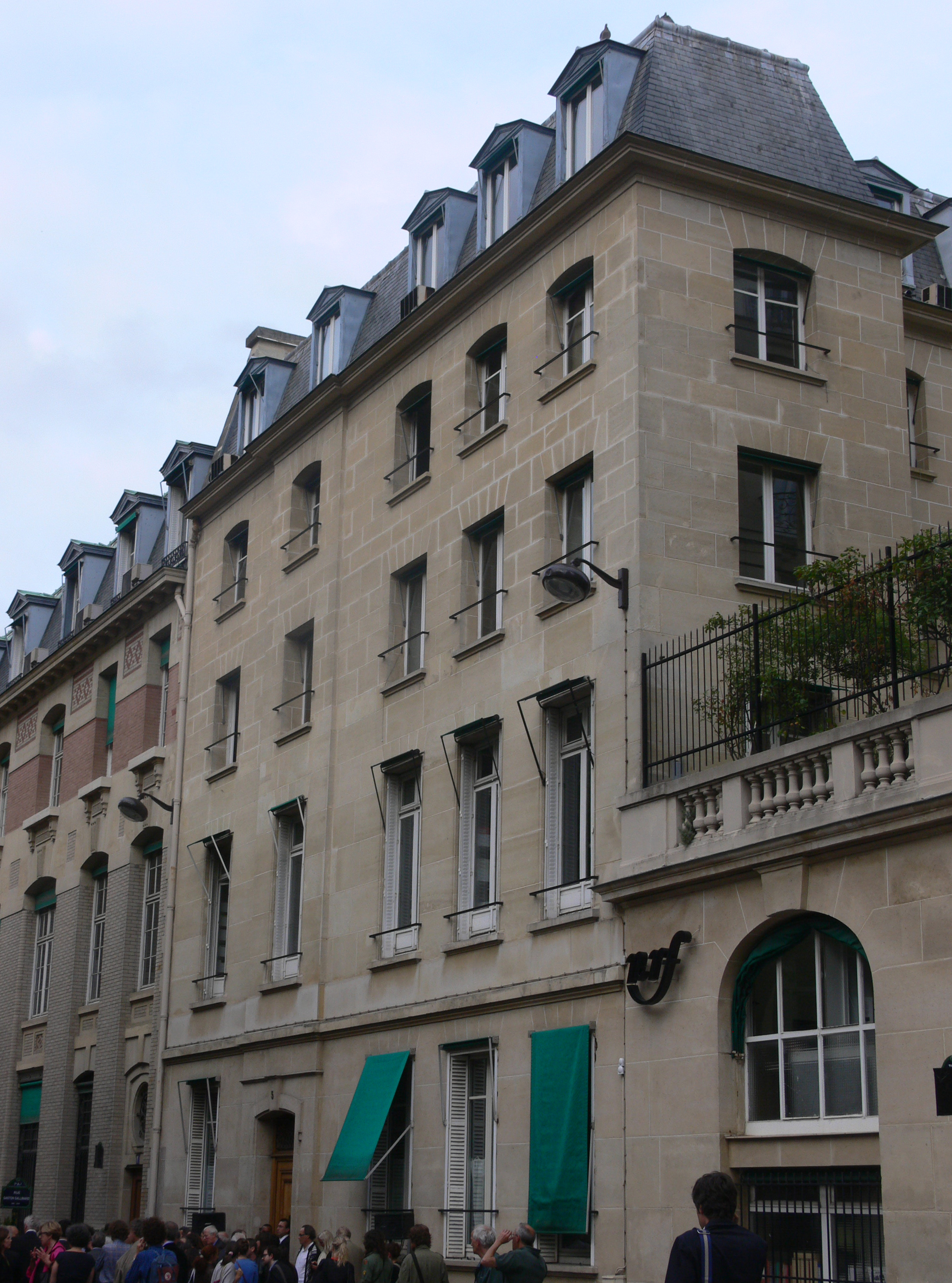 Immeuble de l'éditeur Gallimard